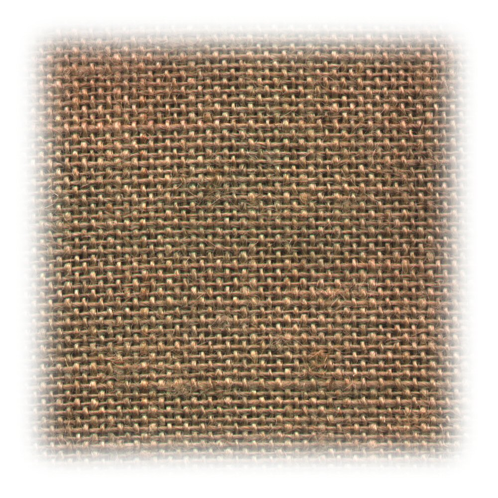 Jute fabric